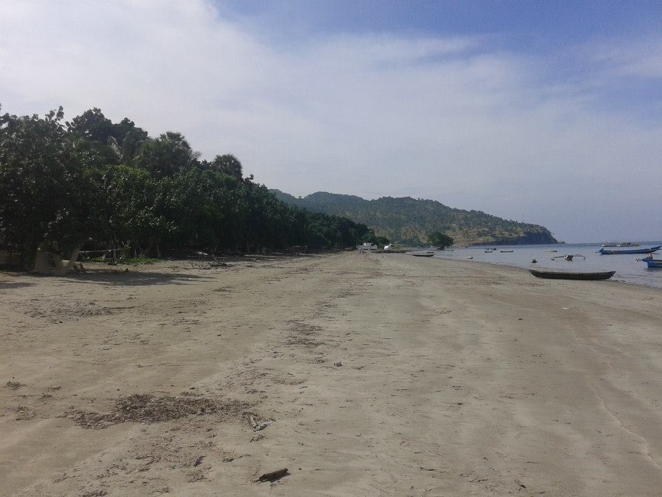 Atauro